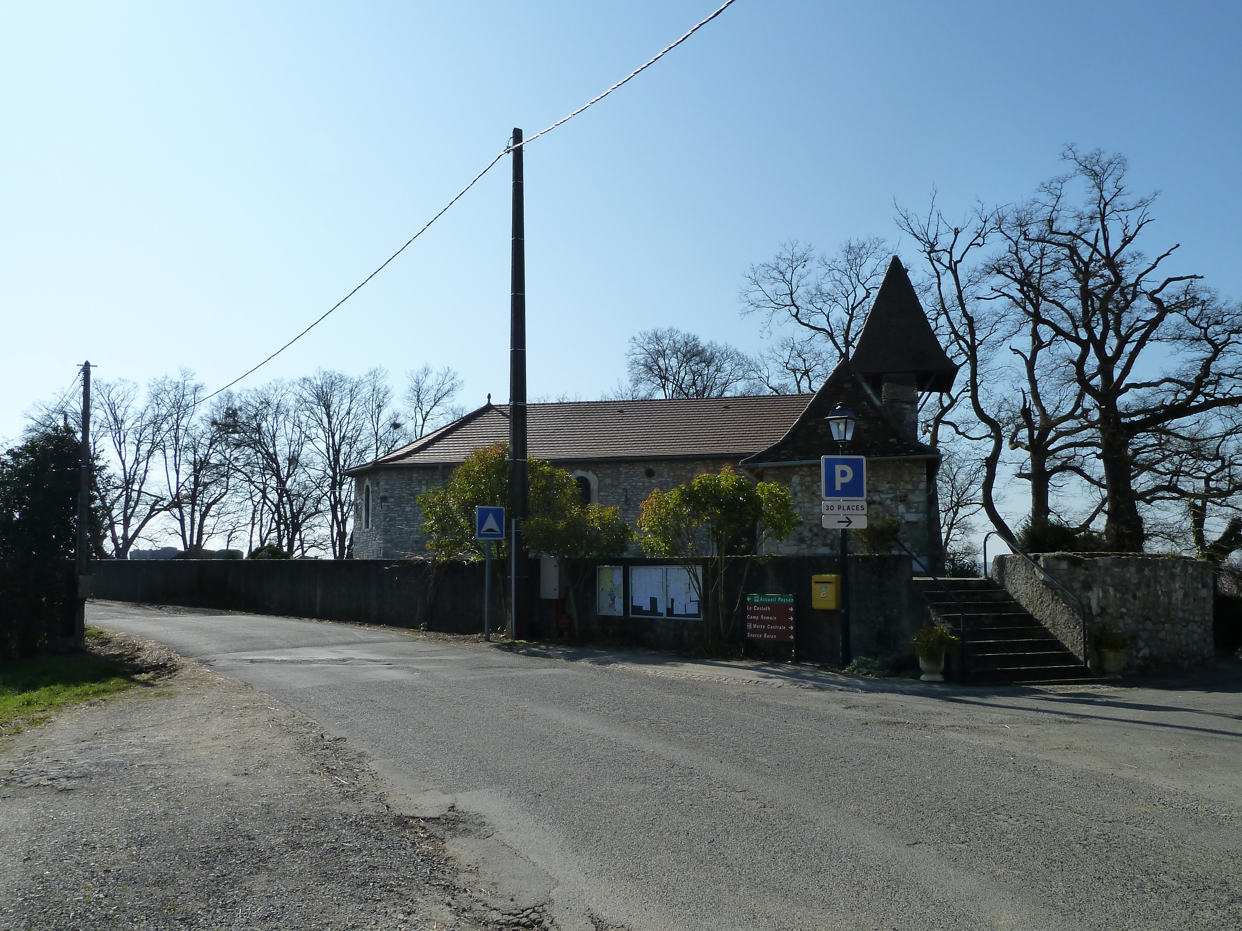 Église de Castetner